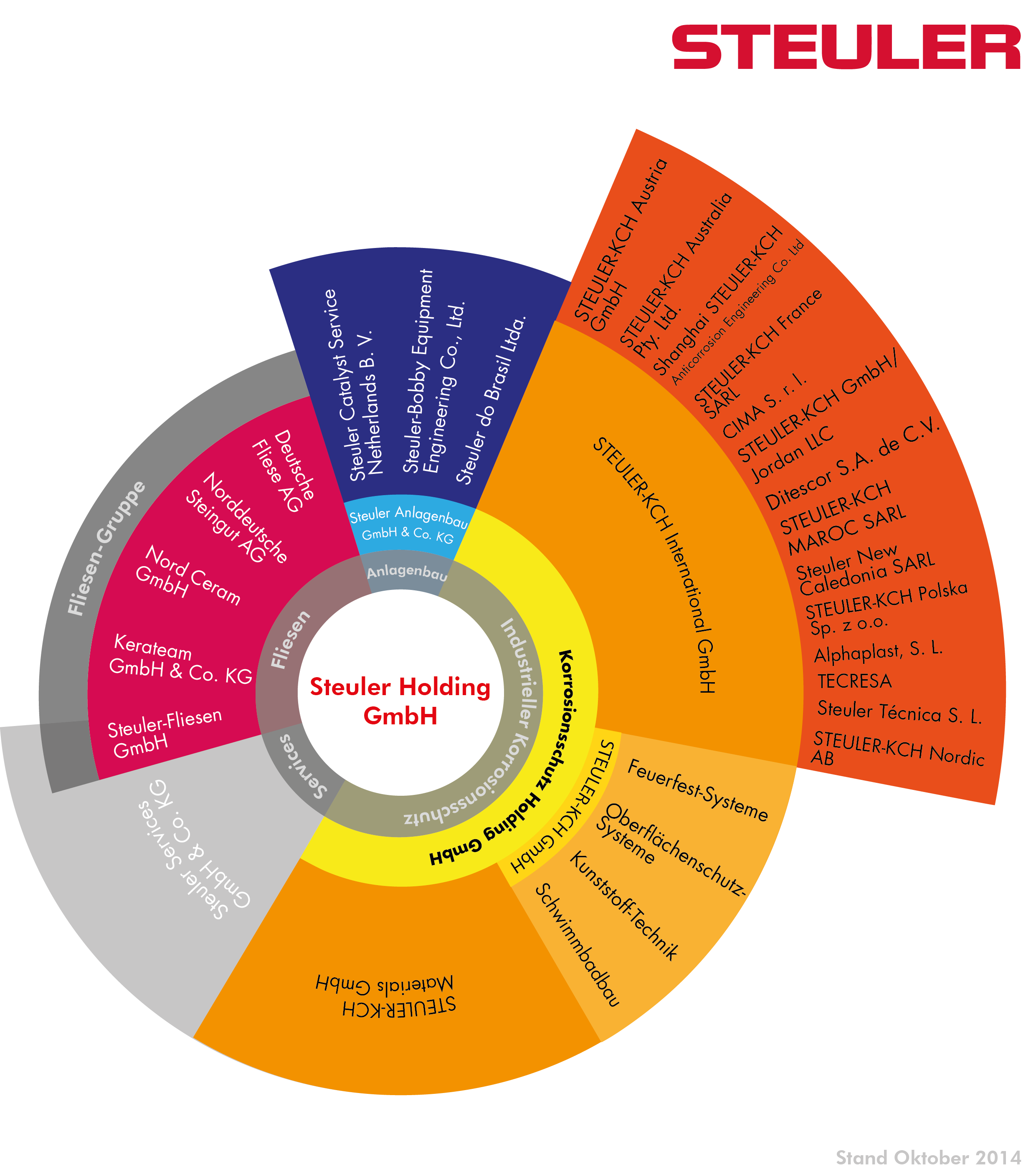 Grafische Darstellung der Unternhemensgruppe Steuler Holding GmbH.